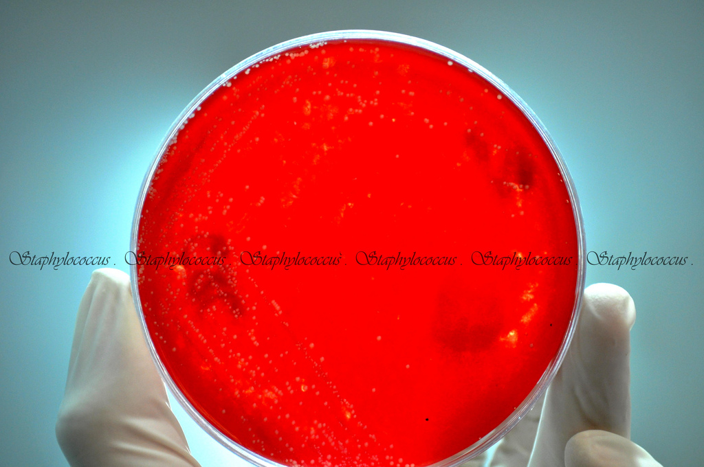 Staphylococcus aureus en agar